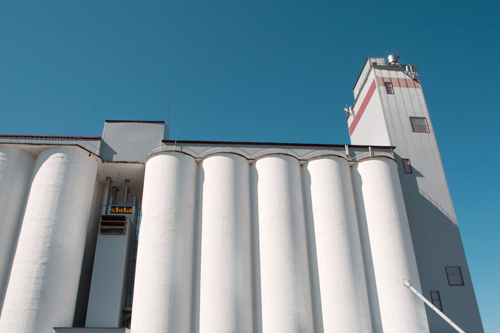 Tartu Mill